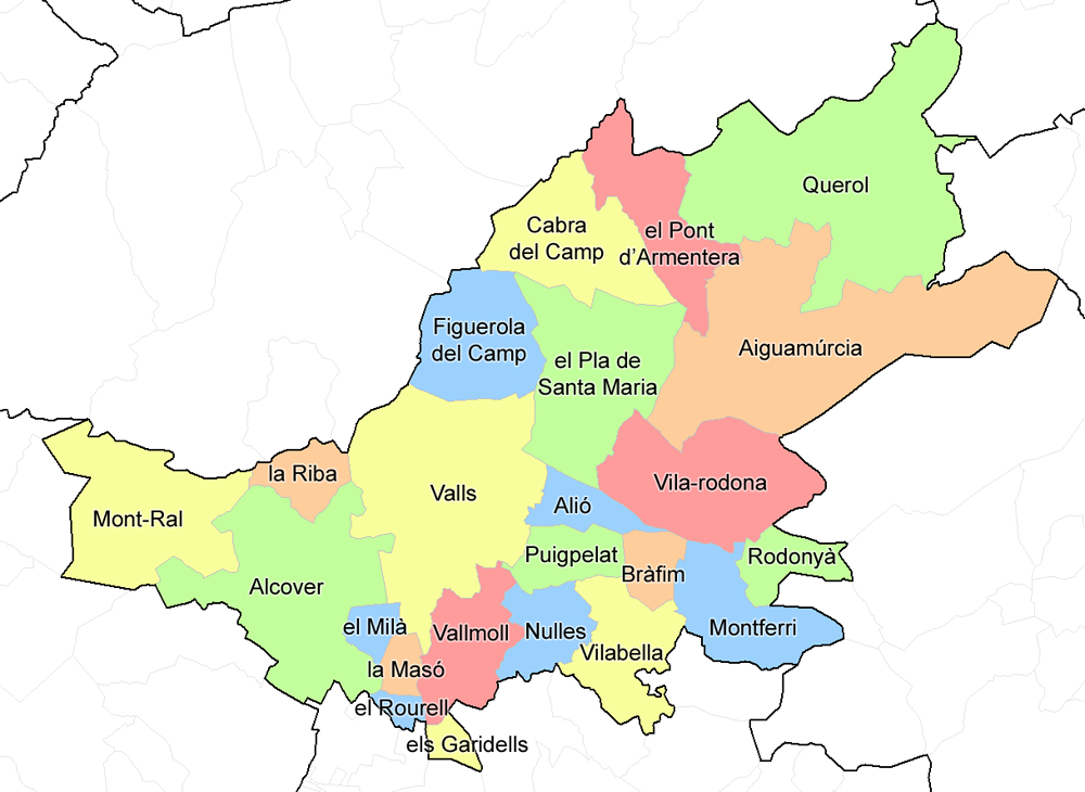 Alt Camp